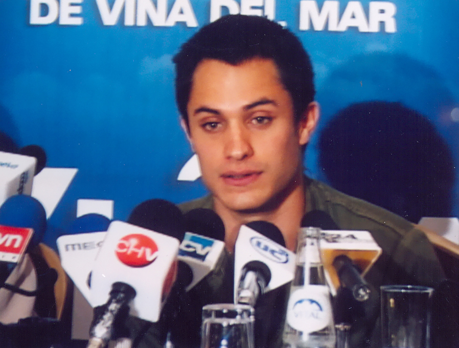 Actor Gael García Bernal (México); Presentación pelicula Diarios de motocicleta; año 2004